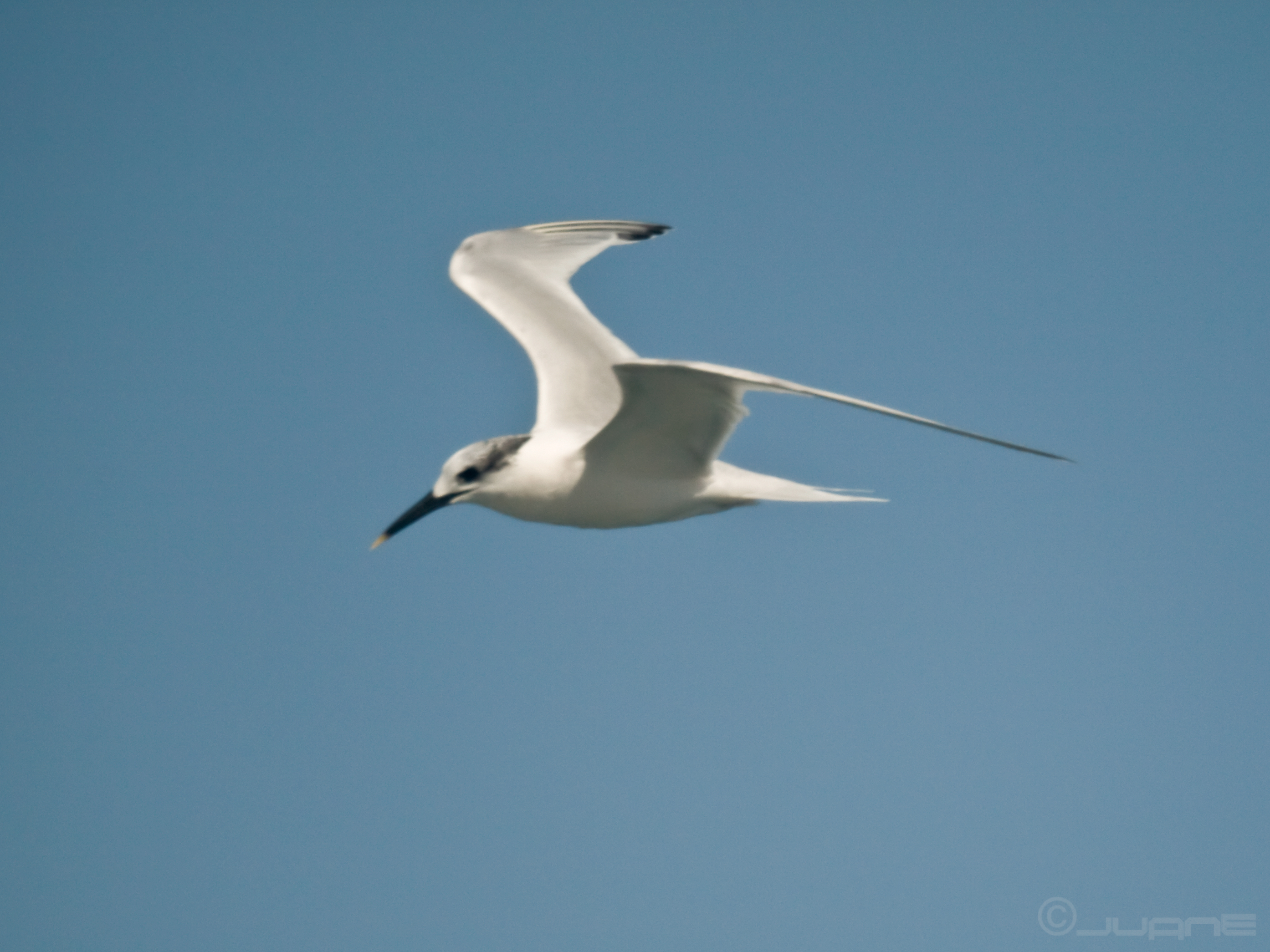 Camara digital + Sigma OM 600mm F 8